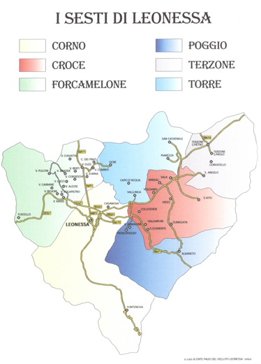 Mappa dei Sesti di Leonessa, ricostruita a cura dell'Ente Palio del Velluto